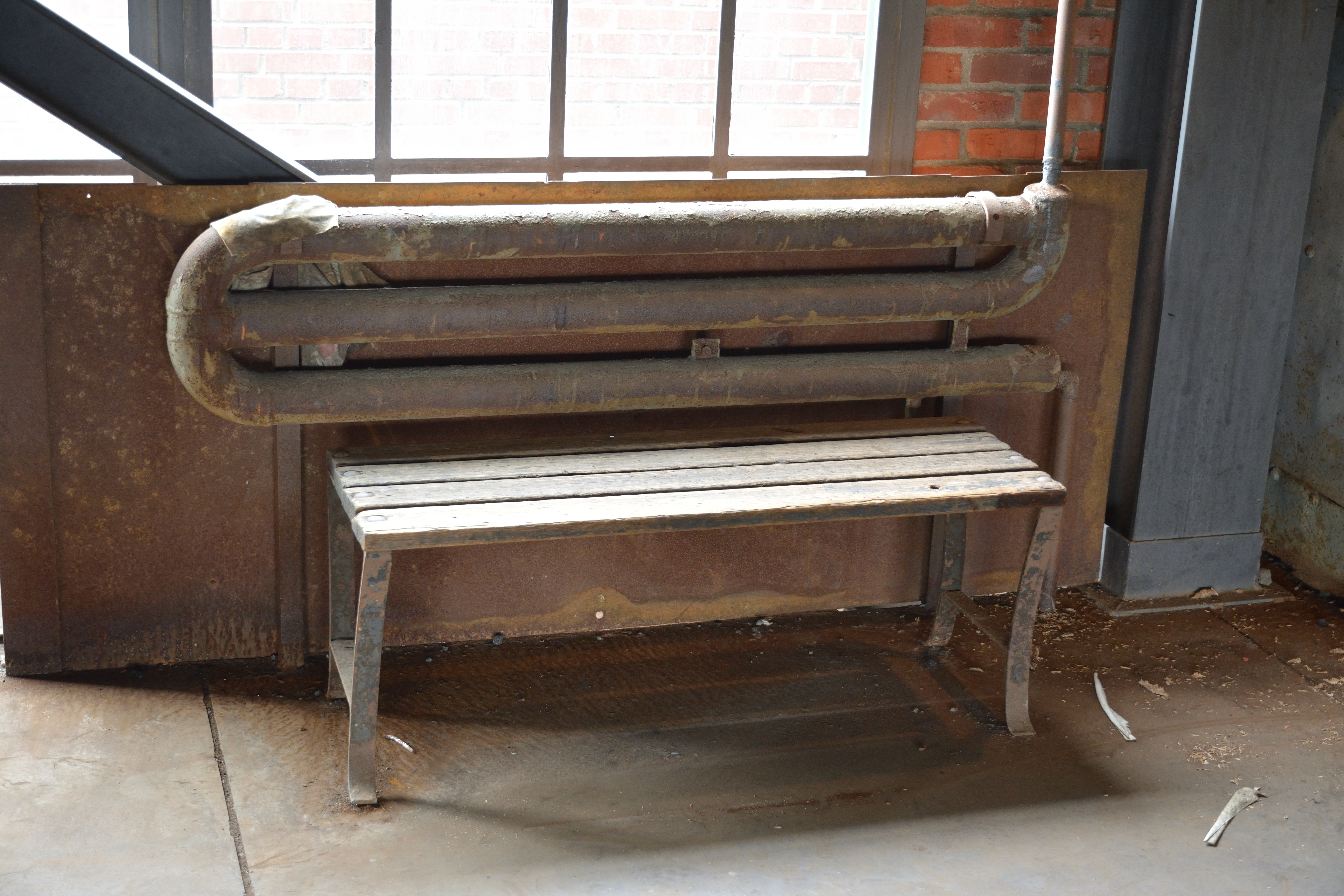 Impressionen von der Zeche "Zollern 2/4" in Dortmund. Hier: Das Leseband in der Schachthalle war unbeheizt. Für den Winter gab es eine "Wärmebank" für die Arbeiter.